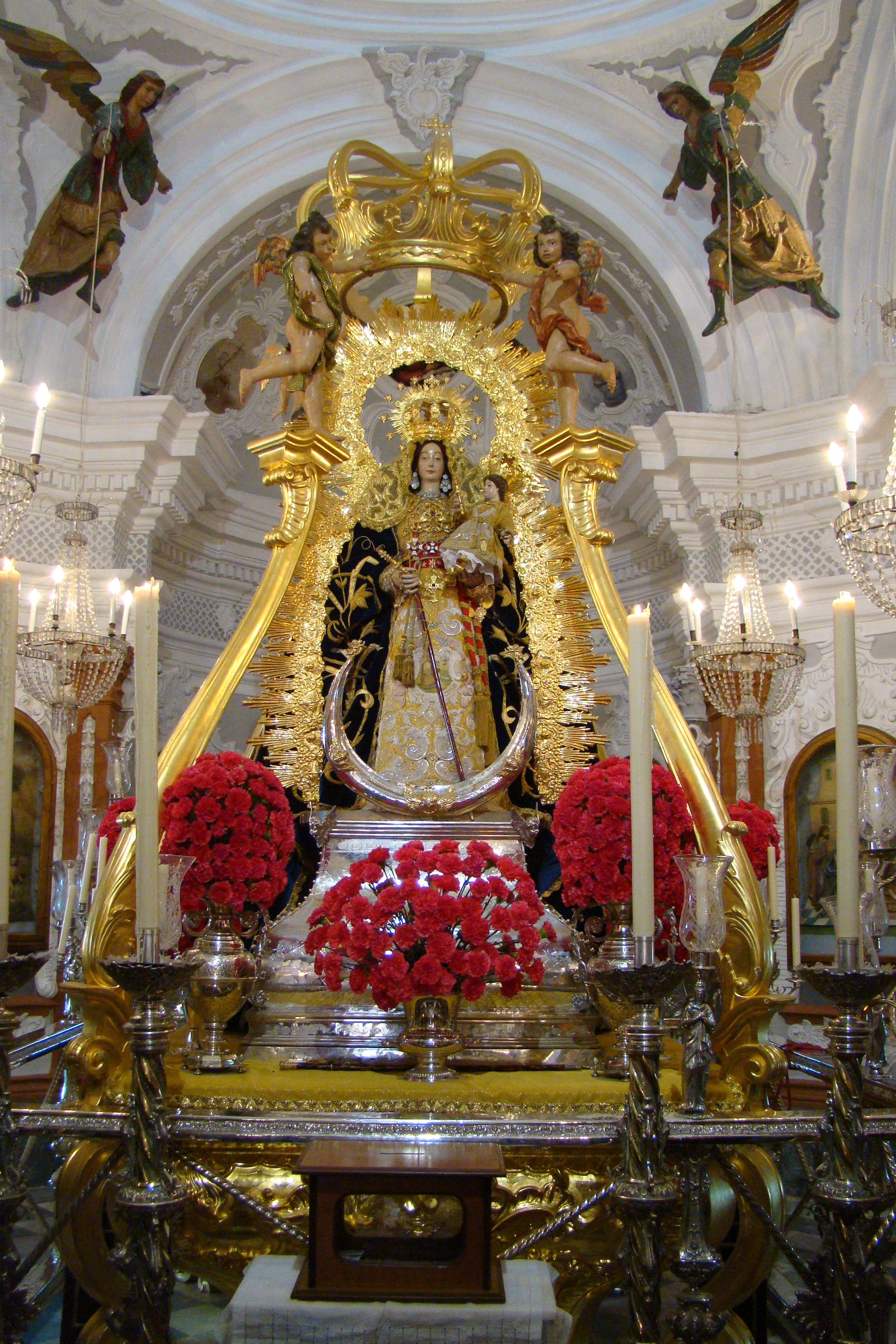 Camarín de Ntra Sra de los Remedios